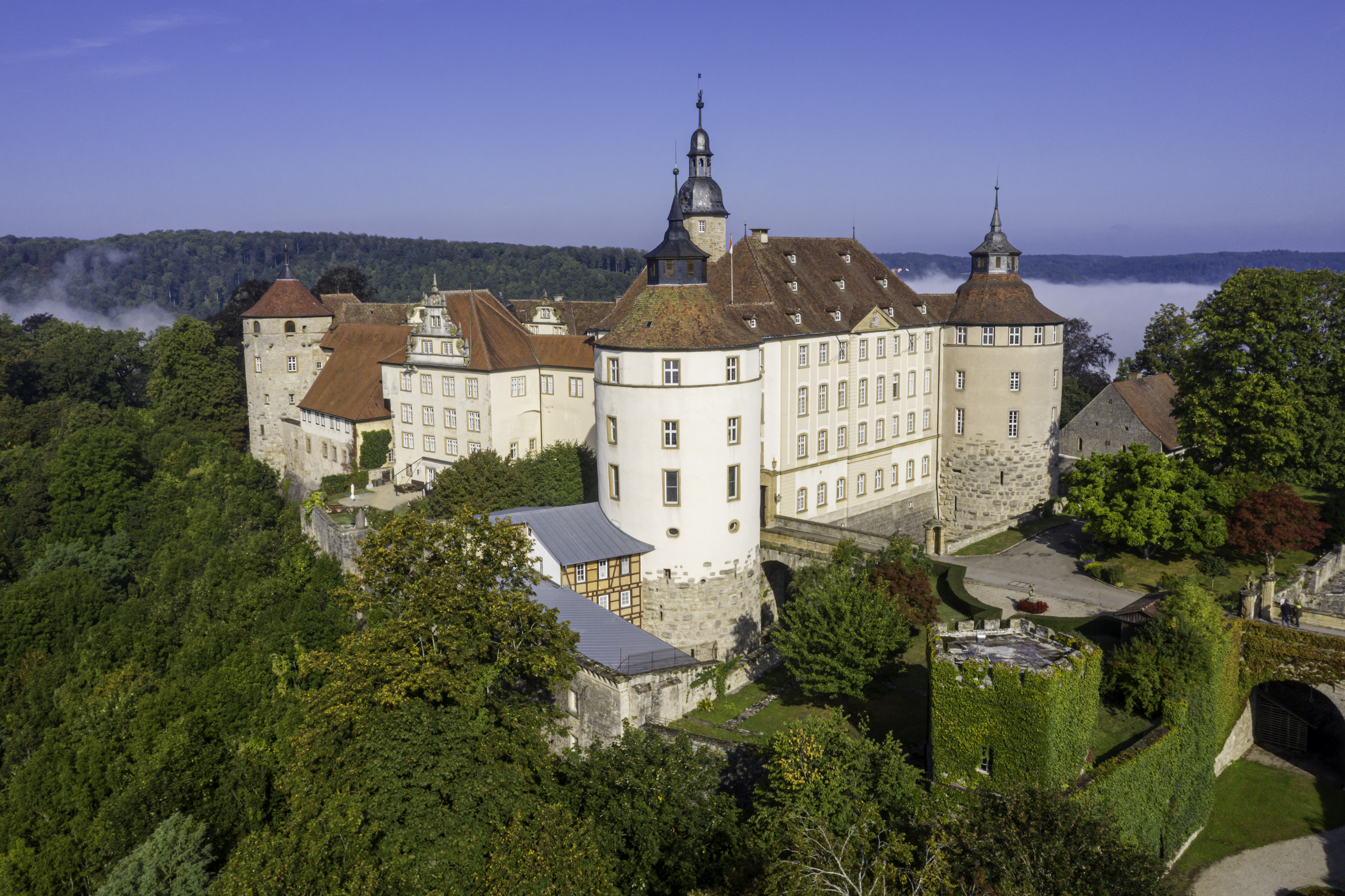 Schloss Langenburg über dem vernebelten Tal der Jagst